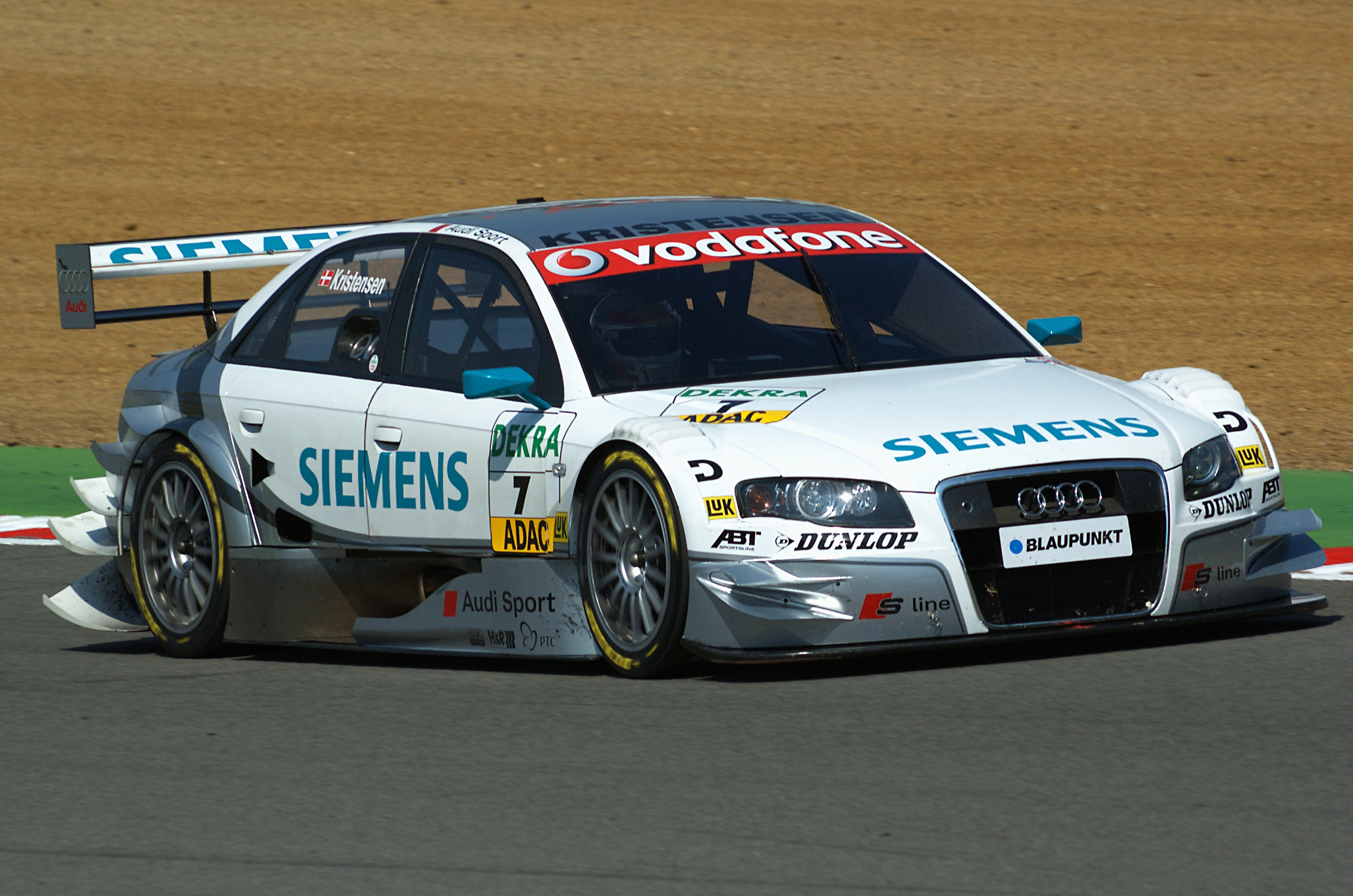 2006 DTM Brands Hatch (Tom Kristensen)